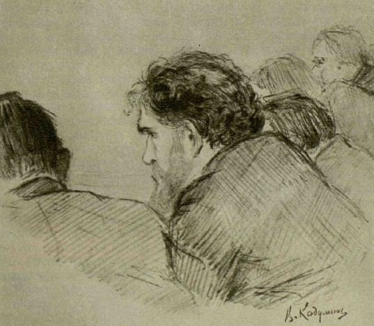 В. Г. Короленко на процессе Бейлиса Vladimir Galaktionovich Korolenko in the Beilis Trial